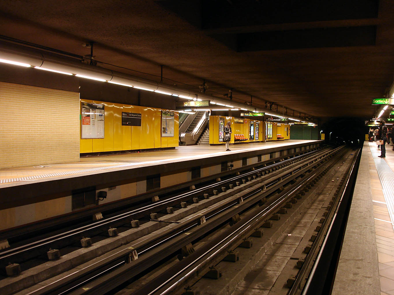 Station Rond-Point du Prado du métro de Marseille, France.